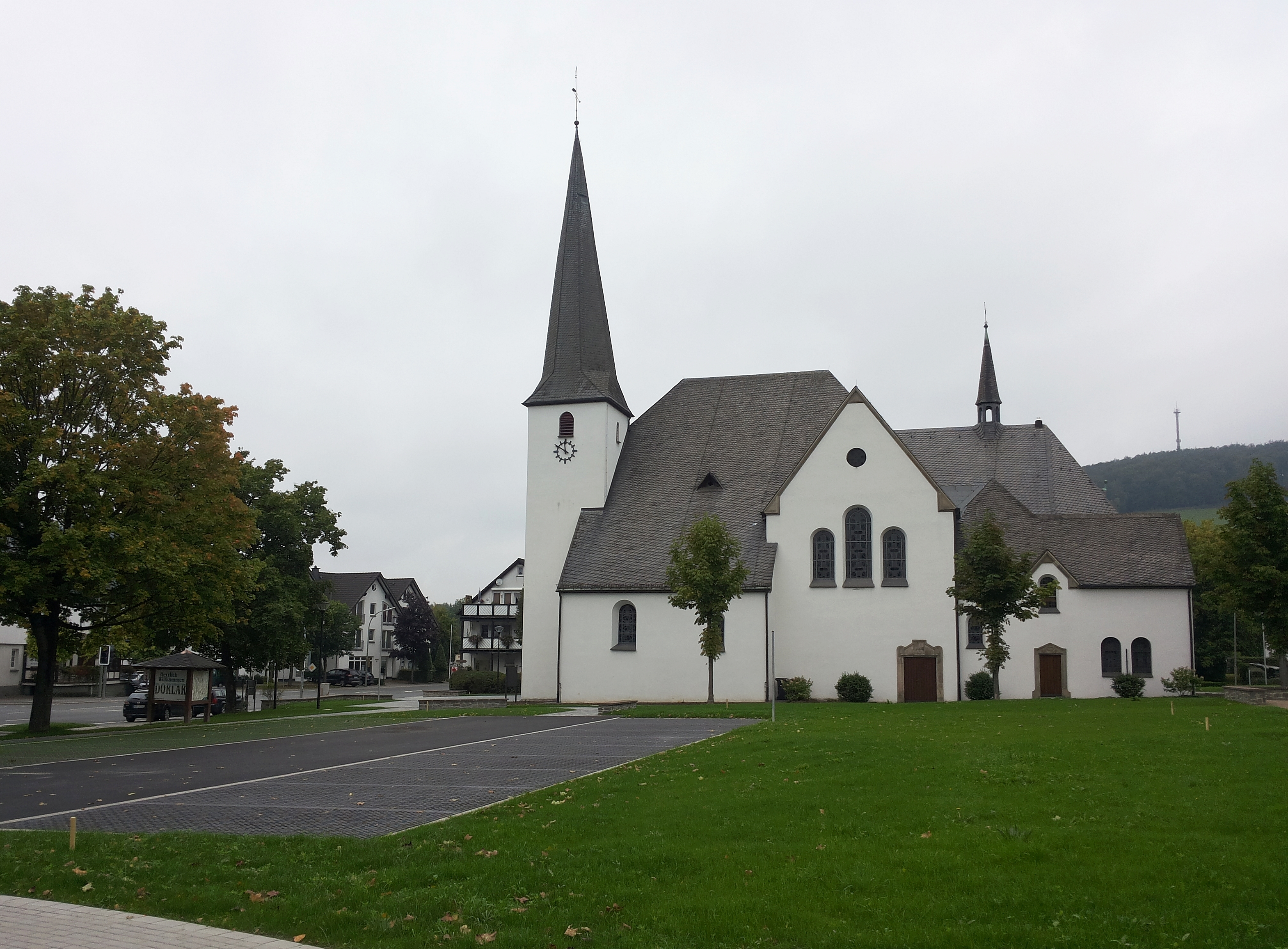 Schmallenberg-Dorlar, Kirche St. Hubertus (Germany)